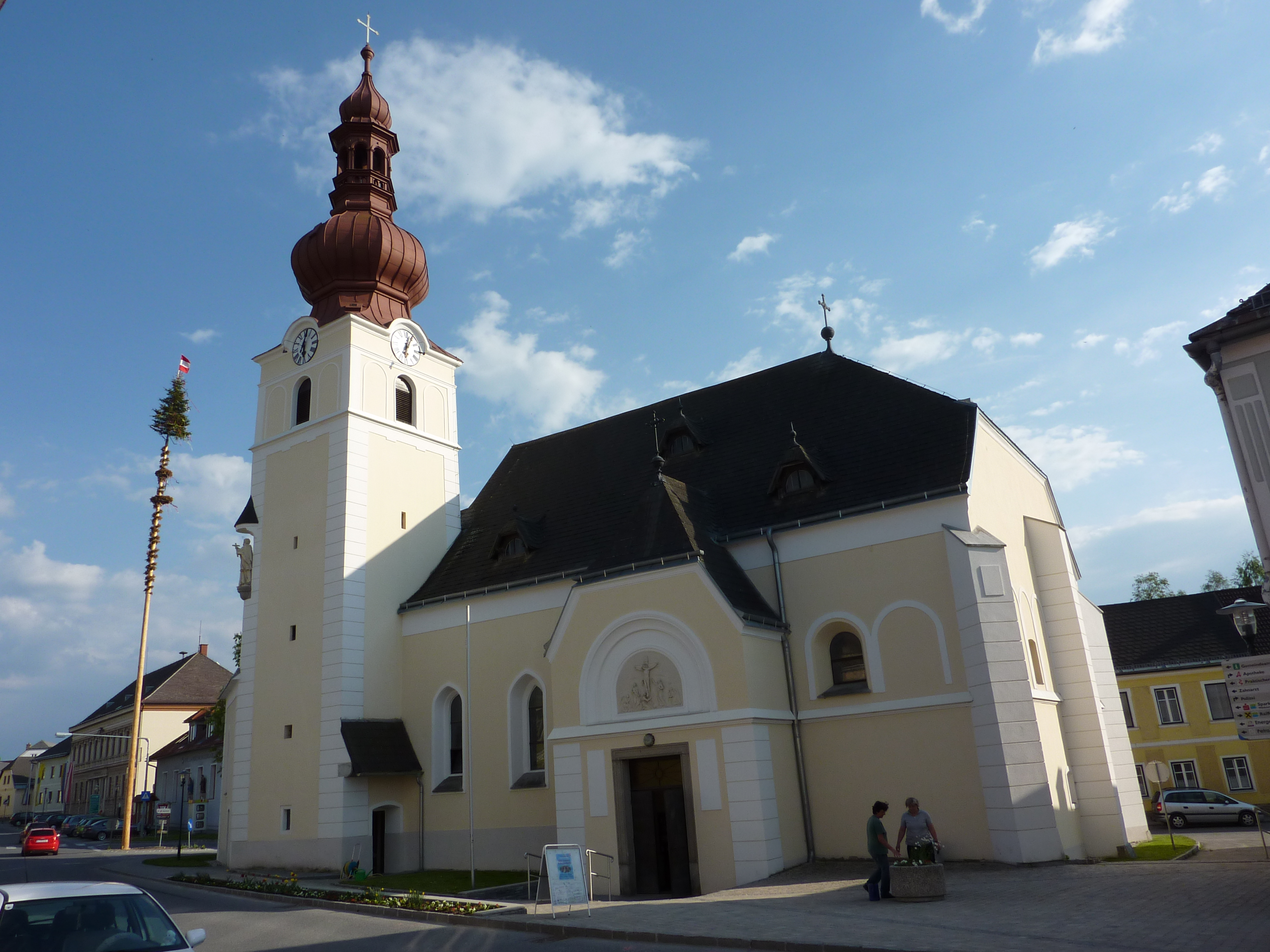 Pfarrkirche, Ottenschlag, Niederösterreich